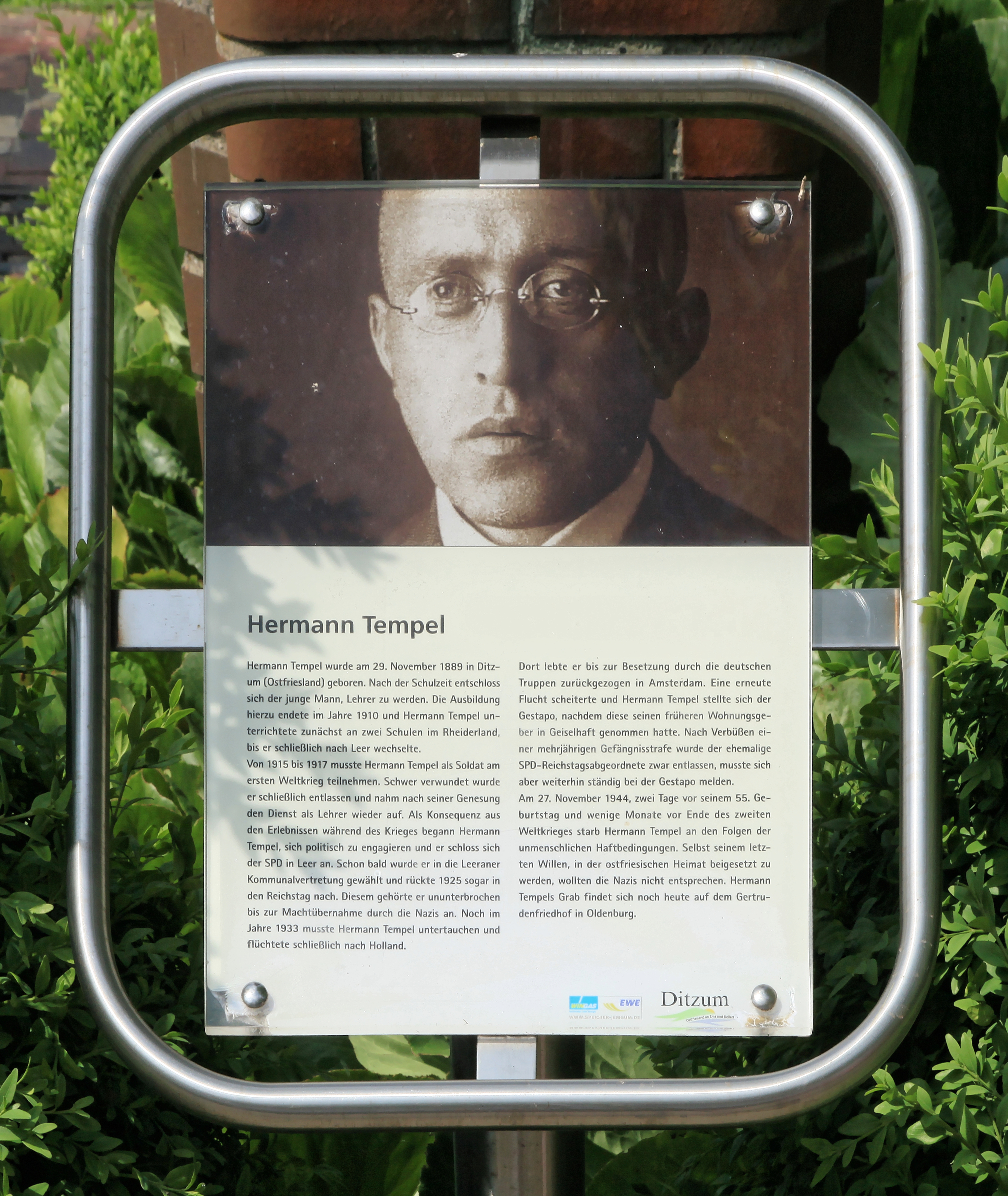 Hermann-Tempel-Denkmal, Hermann-Tempel-Platz in Ditzum, Jemgum